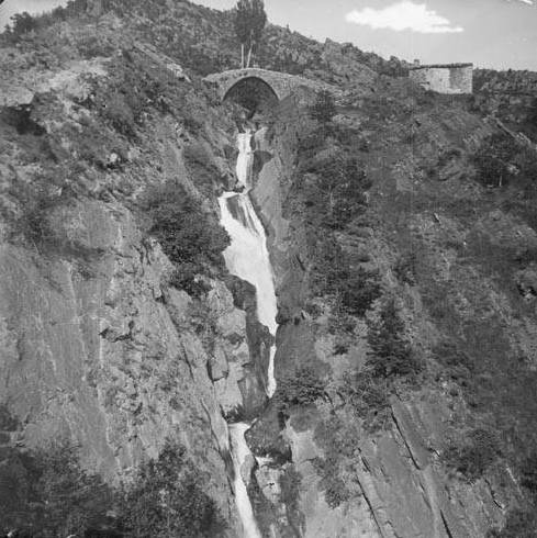 Imatge